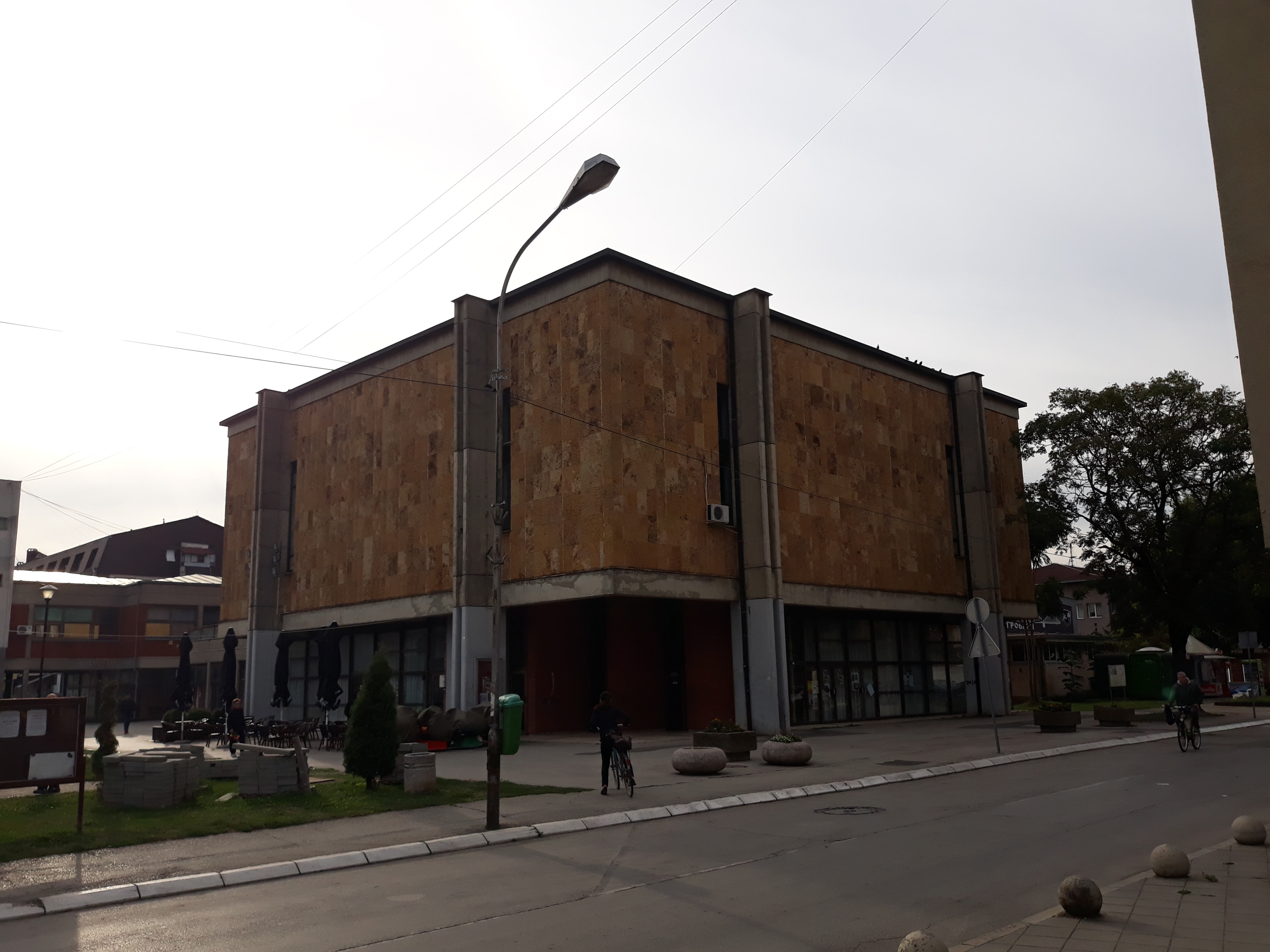 Народни универзитет у Трстенику